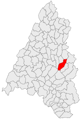 Categorie:Hărţi ale judeţului Bihor